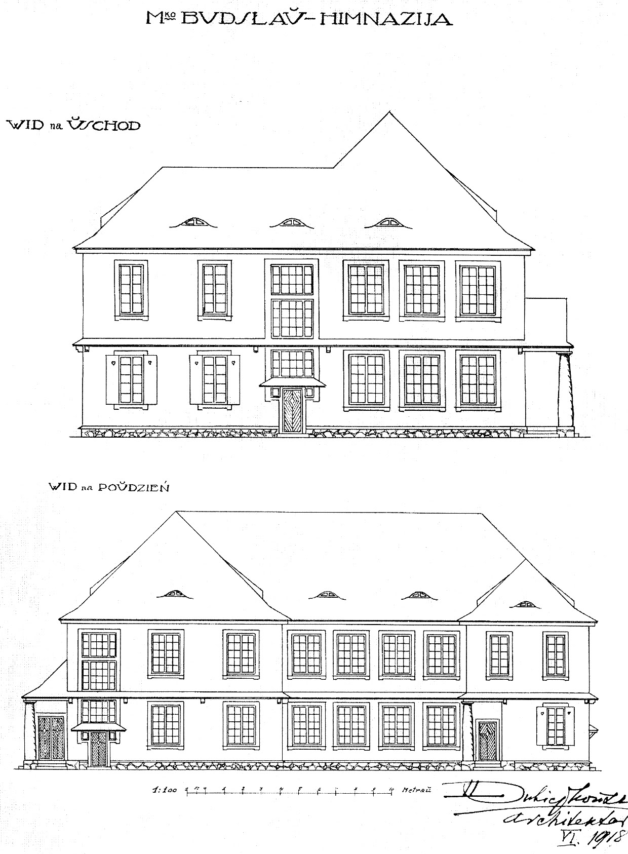 Праект Будслаўскай беларускай гімназіі, выкананы Лявонам Вітан-Дубейкаўскім